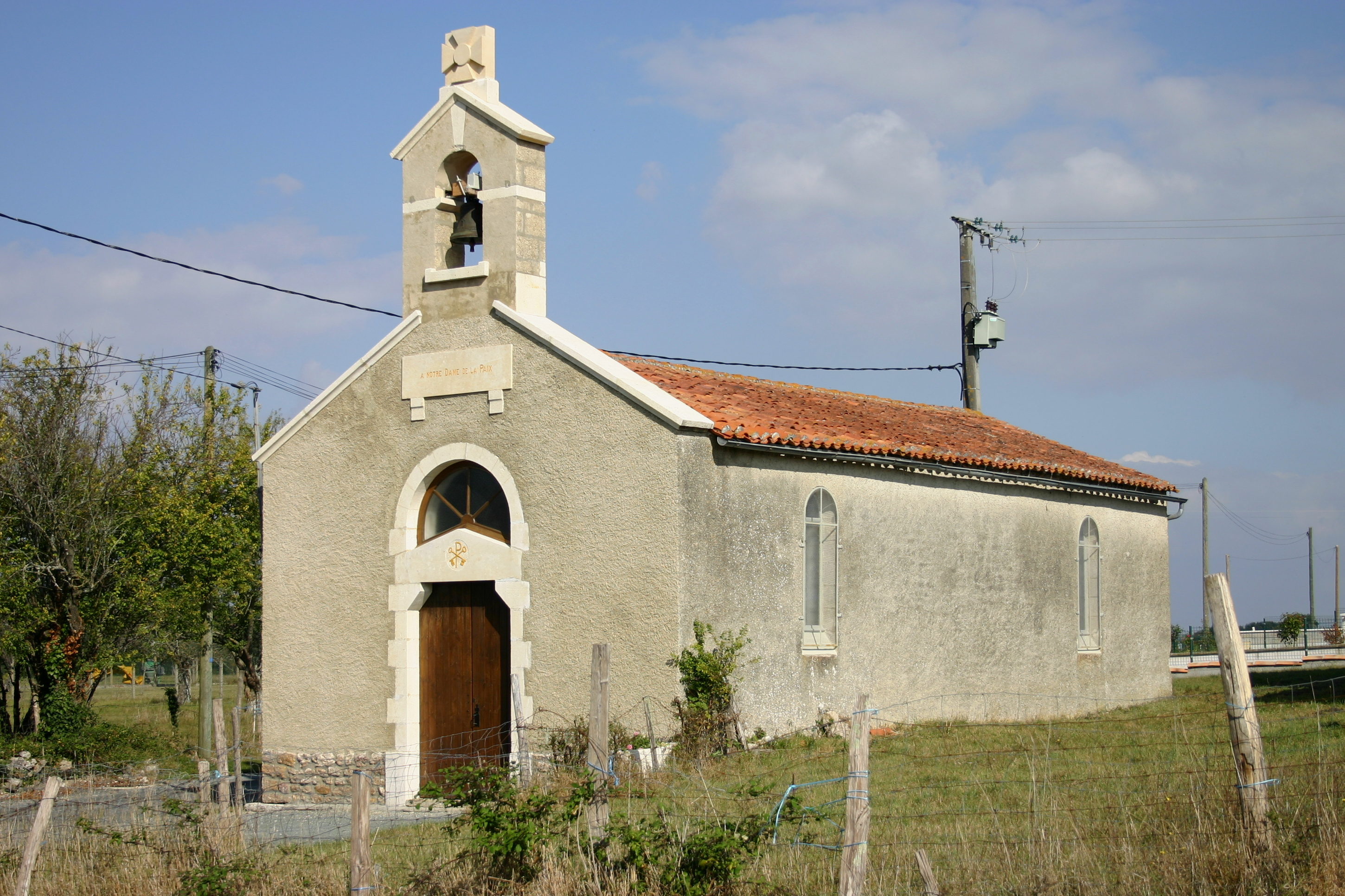 Église de Chantemerle-sur-la-Soie